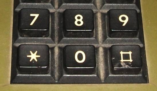 Detail der Tastatur des Fernsprechers FeTAp 751, für die Deutsche Bundespost im Februar 1982 von Siemens hergestellt (Ausschnitt des Originalfotos)